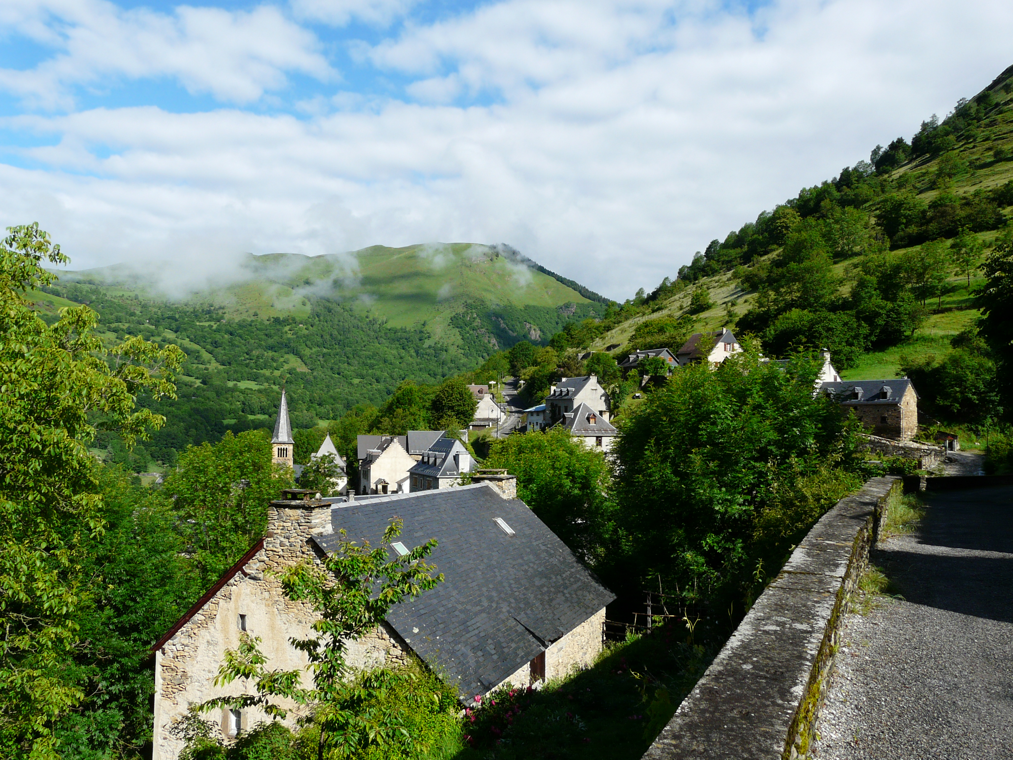 Le village de Saccourvielle vu depuis l'est, Haute-Garonne, France.